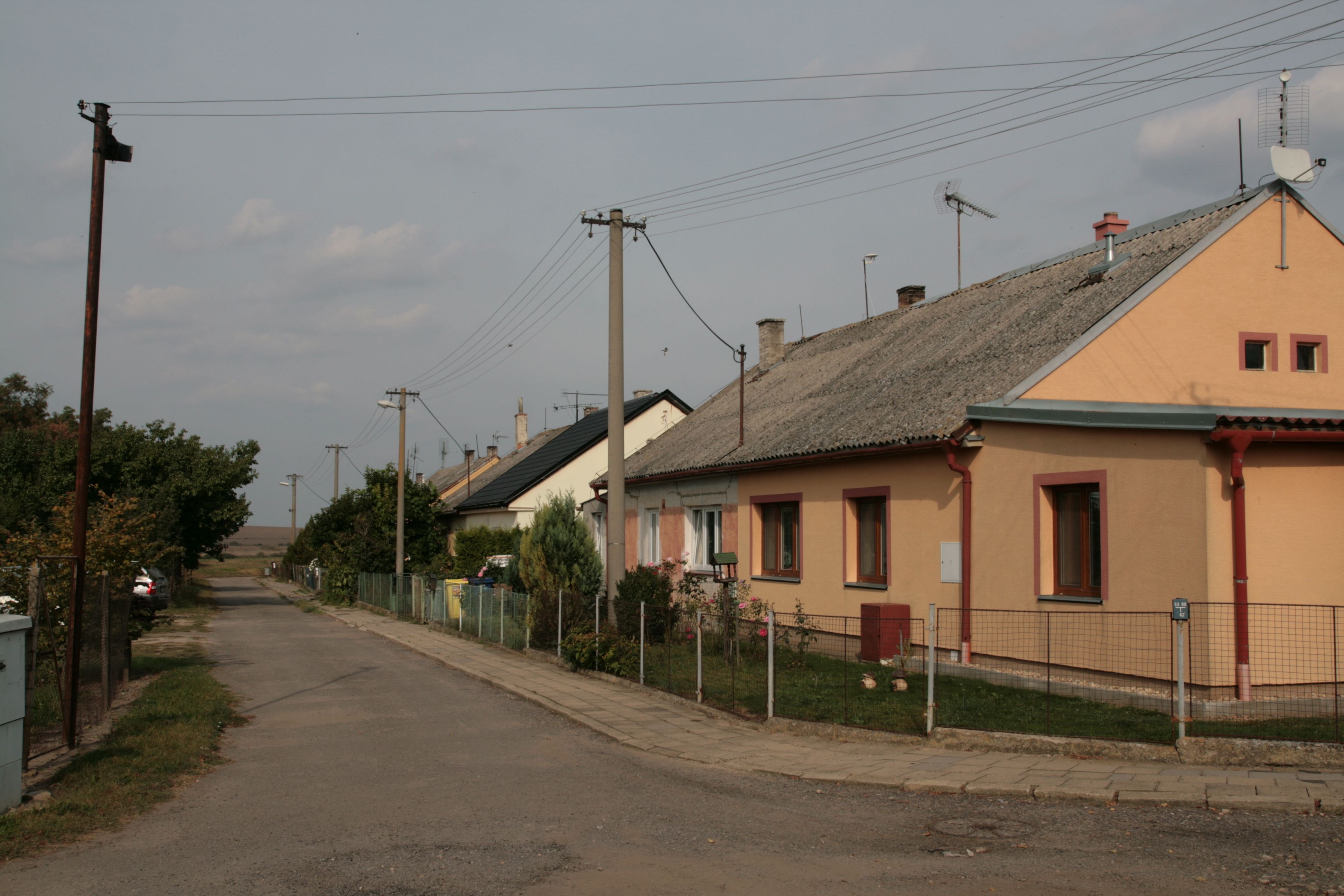 Osada Hnízdo, část obce Vrbovec v okrese Znojmo. Severní část zástavby.